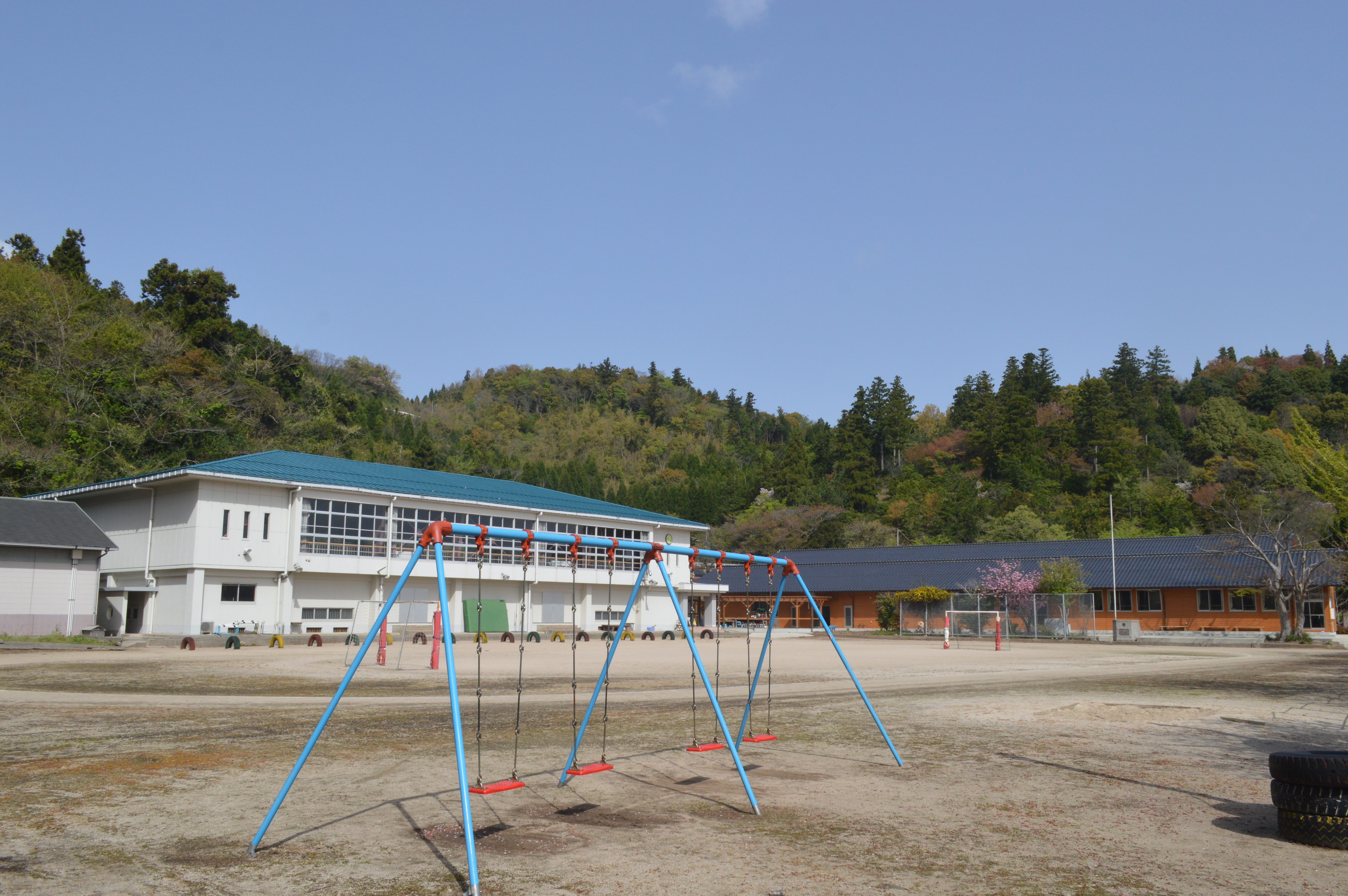 島根県隠岐郡海士町の海士町立福井小学校。